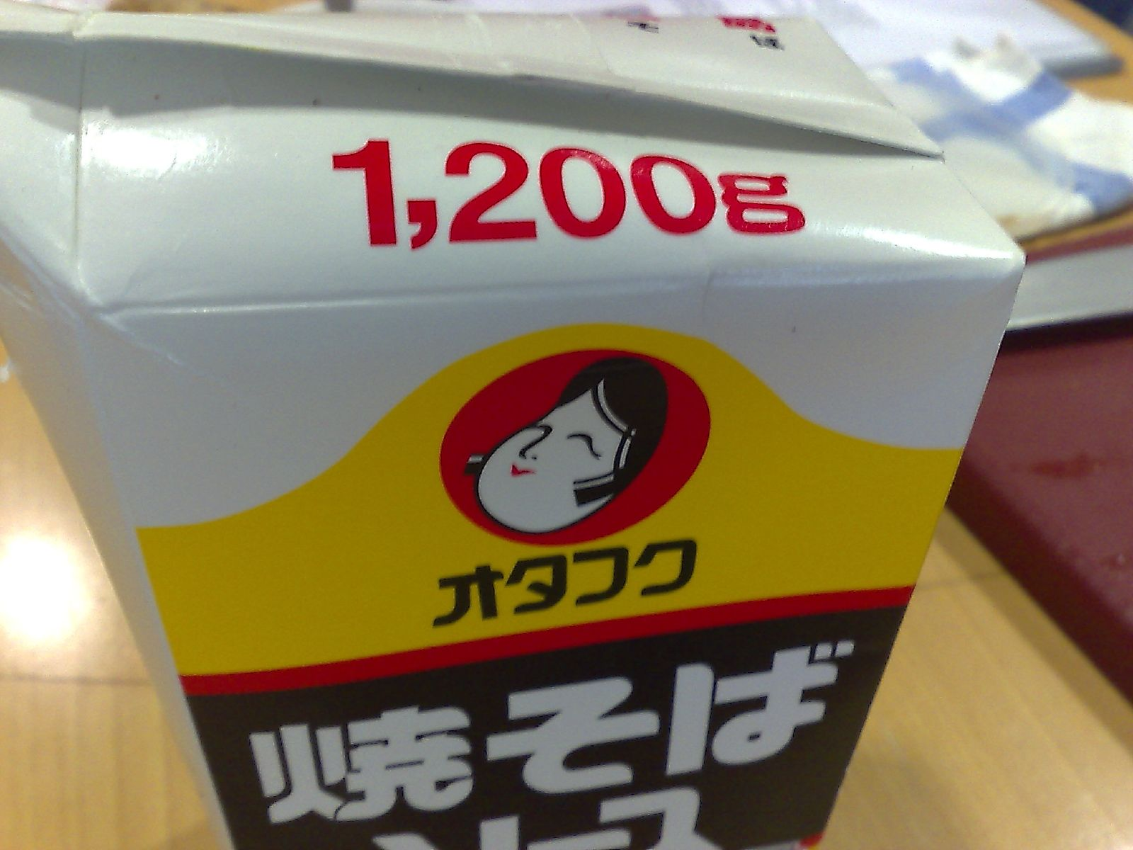 焼きそば専用ソース